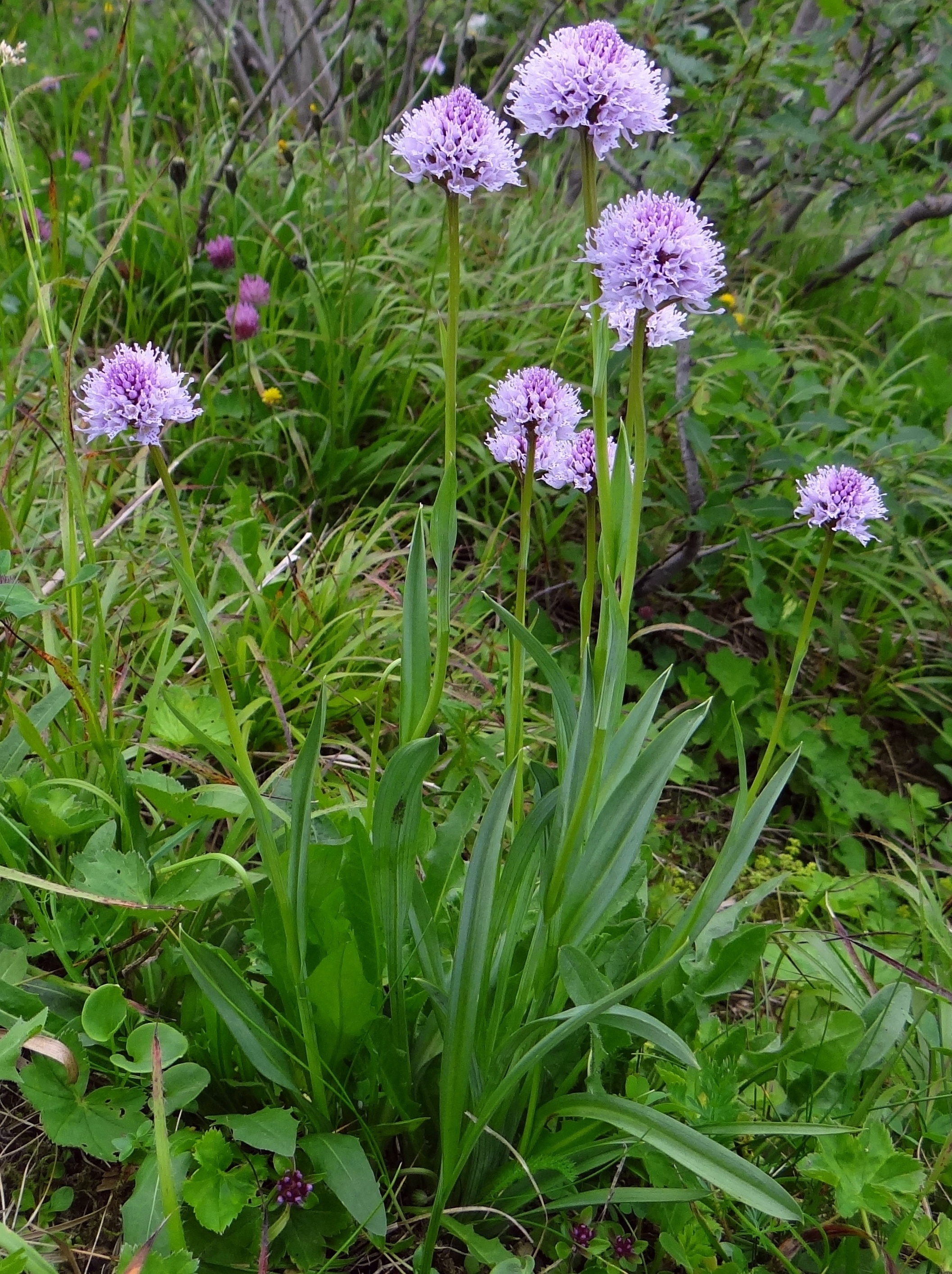 Traunsteinera globosa (habitat:West Tatra Mountains, Hala Upłaz)